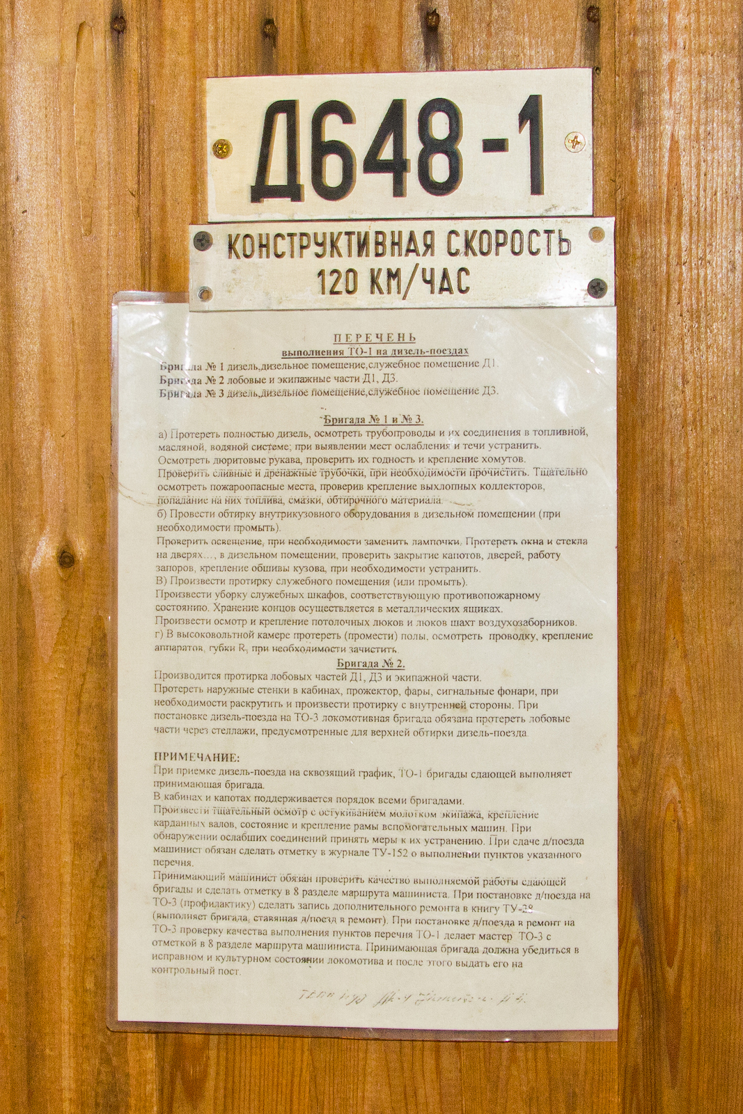 Таблички дизель-поезда Д1-648 из кабины управления. Из личной коллекции.